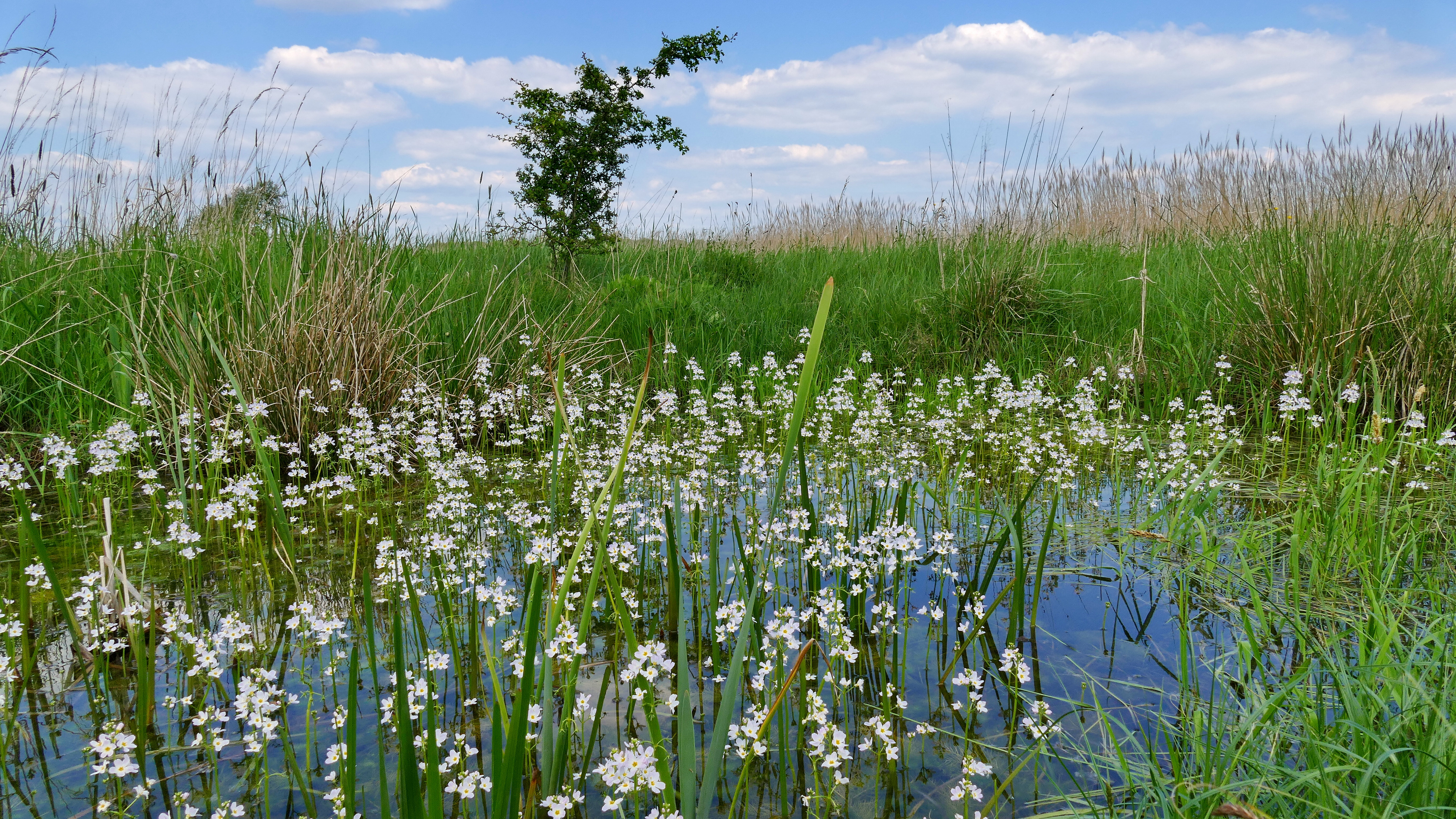 NSG-HA 133 "Hahnenkamp“: Dieses Naturschutzgebiet ist vorwiegend von Feuchtgrünland geprägt, hier ist ein Kleinstgewässer mit der Europäischen Wasserfeder oder Wasserprimel (Hottonia palustris) zu sehen. Auch eines der hier typischen Röhrichte ist zu erkennen. Das NSG ist deckungsgleich mit dem FFH-Gebiet Hahnenkamp (3626-301).